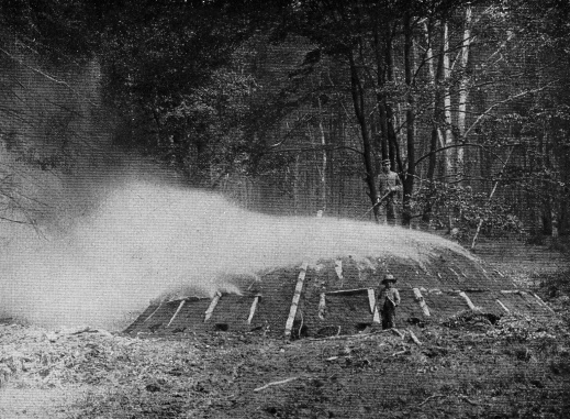 Originalbeschreibung „Köhler im Solling auf dem brennenden Meiler“. – Niedersachsen, Deutschland.